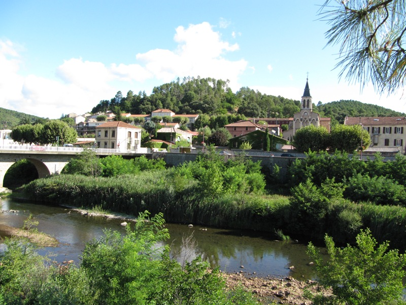 Bessèges au bord de la rivière de la Cèze. vue de l'église de l'Immaculée-Conception (19e siècle), une des rares églises françaises à avoir la devise « Liberté-Égalité-Fraternité, République française » inscrite sur le fronton.